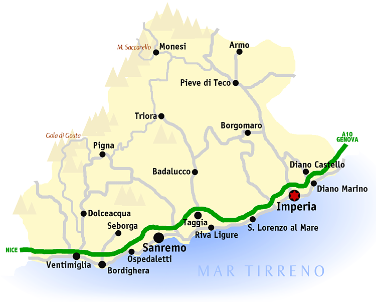 Kaart van de provincie Imperia